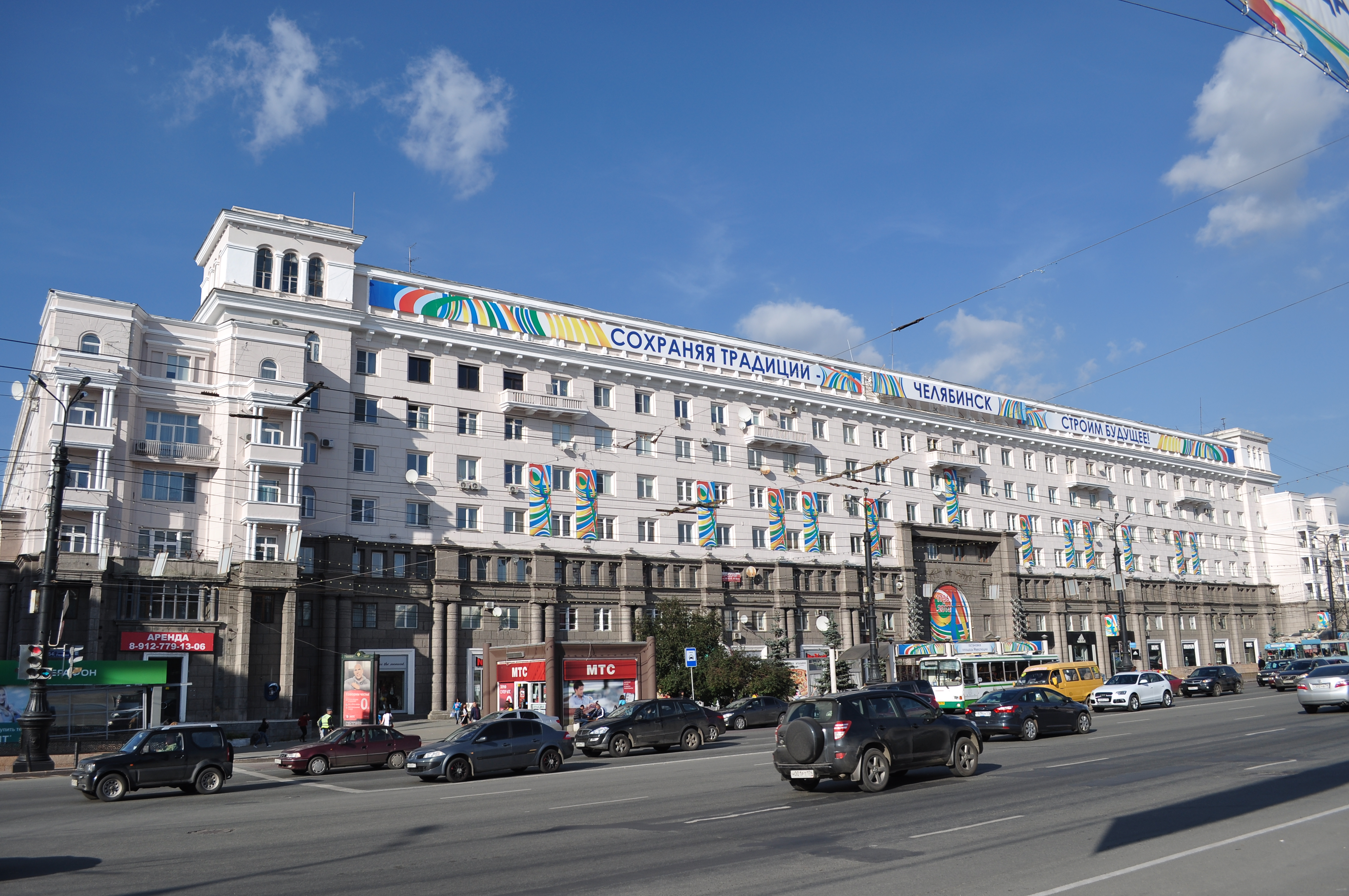 Дом жилой облисполкома, площадь Революции (Челябинская область, Челябинск, Цвиллинга улица, 36, улица Ленина, 54, Кирова улица, 177)